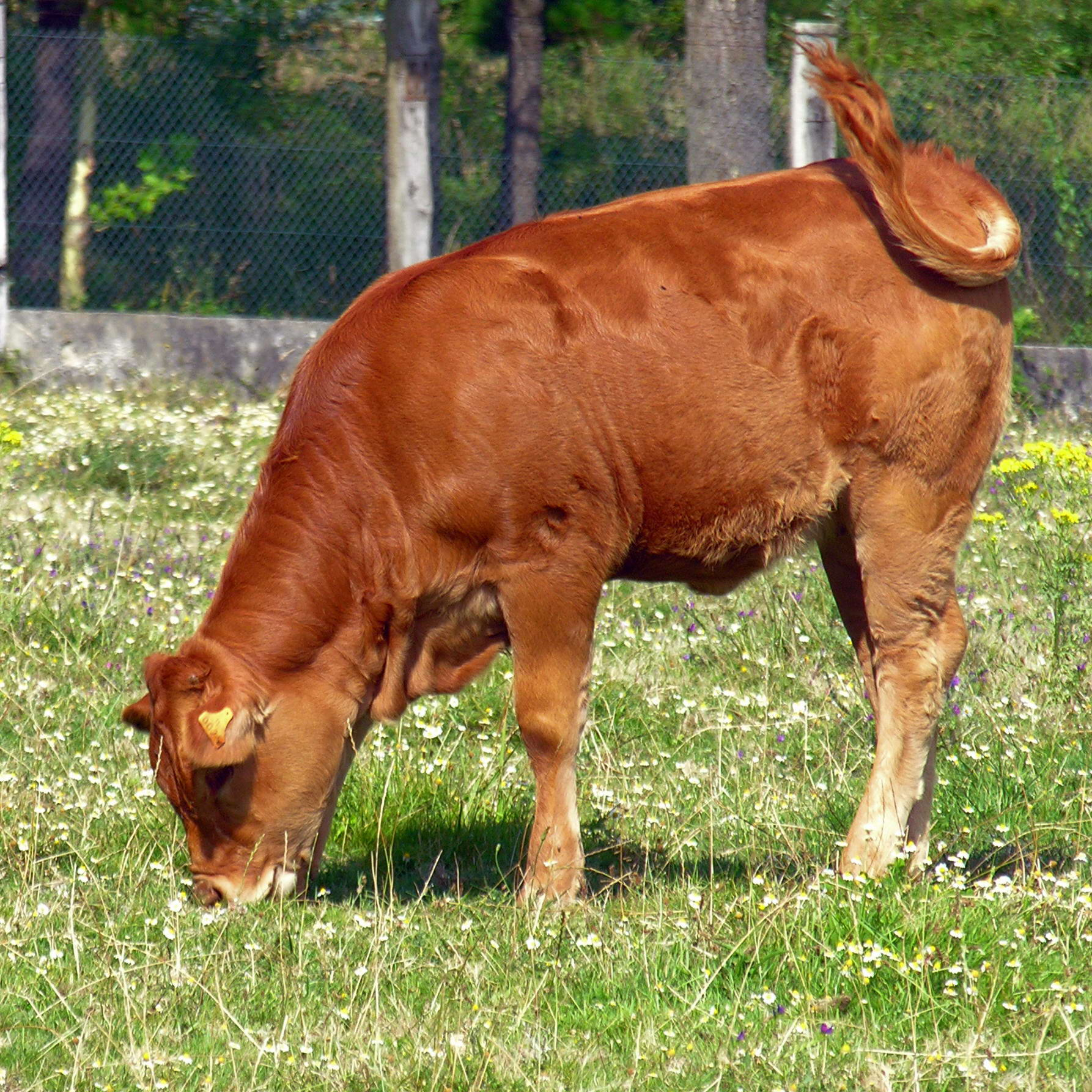 Vaca rubia galega en Oroso, Galiza.